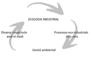 Esquema del cicle de l'ecologia industrial.